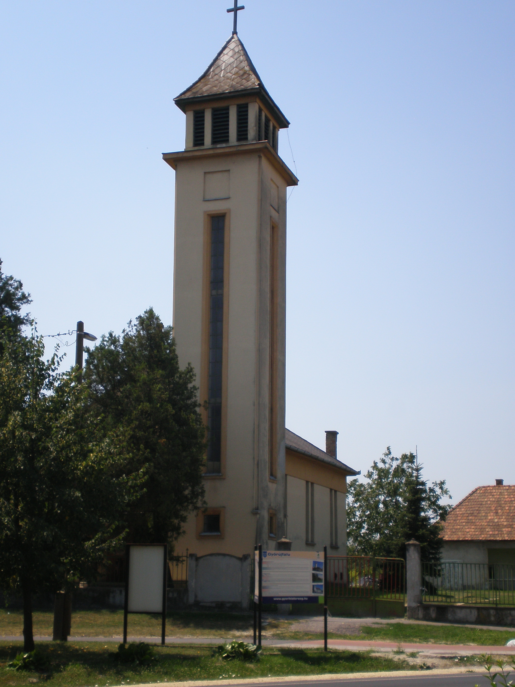 Evangélikus templom Tervező/Kivitelező/Építés éve: Káldy Barna/Káldy Sándor/1949. (Győrújfalu, Győr-Moson-Sopron megye, Magyarország)